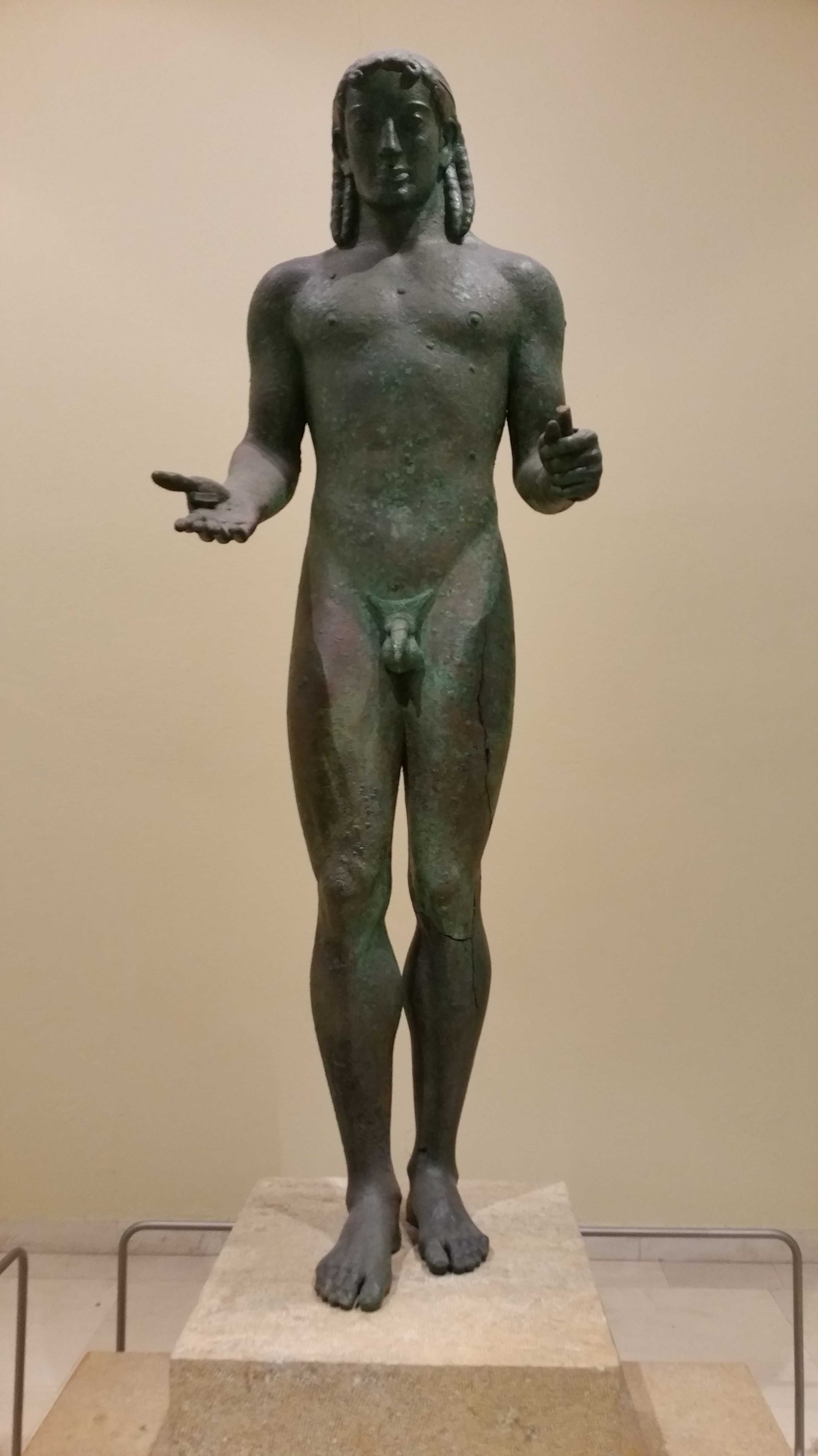 Statue cultuelle d'Apollon, en bronze, datée du début du Vème siècle ou de 520-530 av. JC. A l'origine le Dieu tenait un arc dans sa main gauche et un vase à libation dans sa main droite. Musée archéologique du Pirée, Grèce.